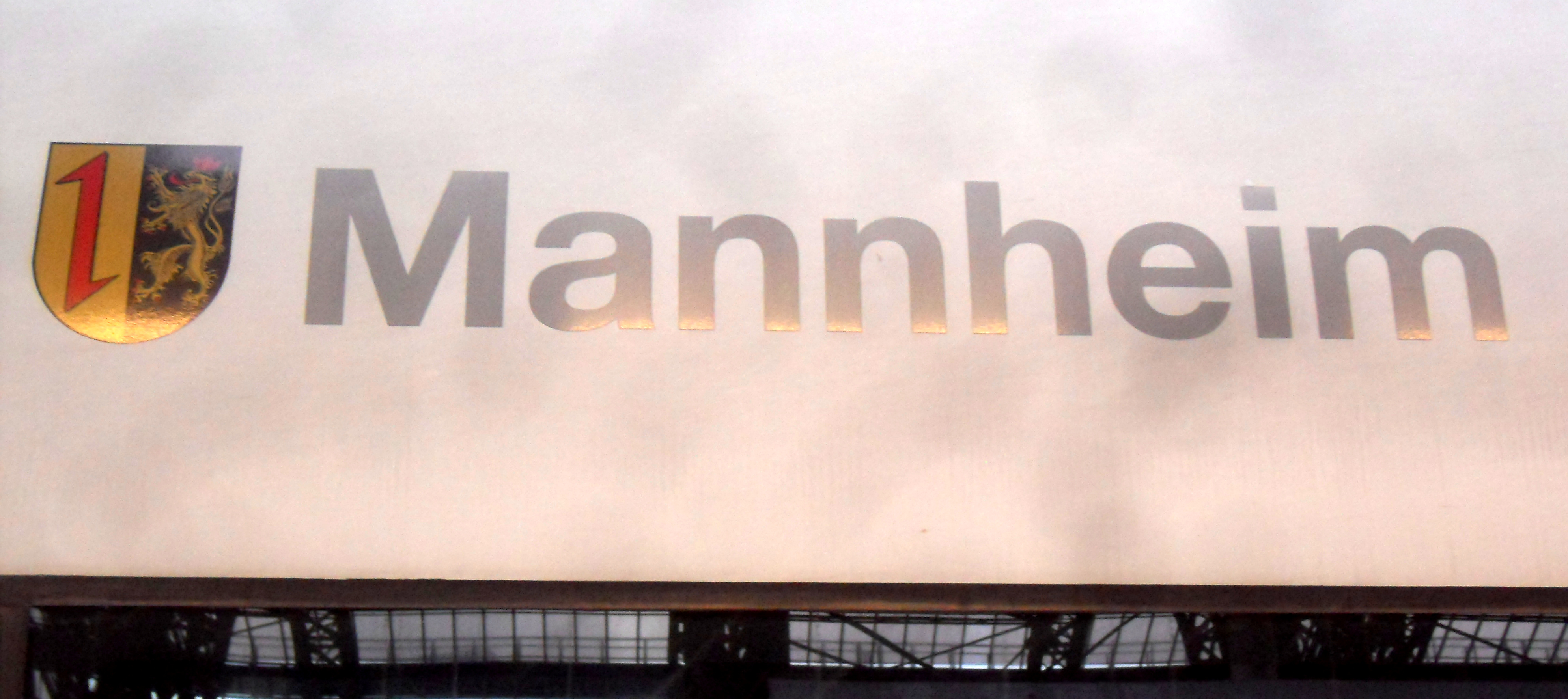 Namensbezeichnung „Mannheim“ des ICE 406 503-3 (Tz 4603). Der ICE steht im Frankfurter (Main) Hauptbahnhof.